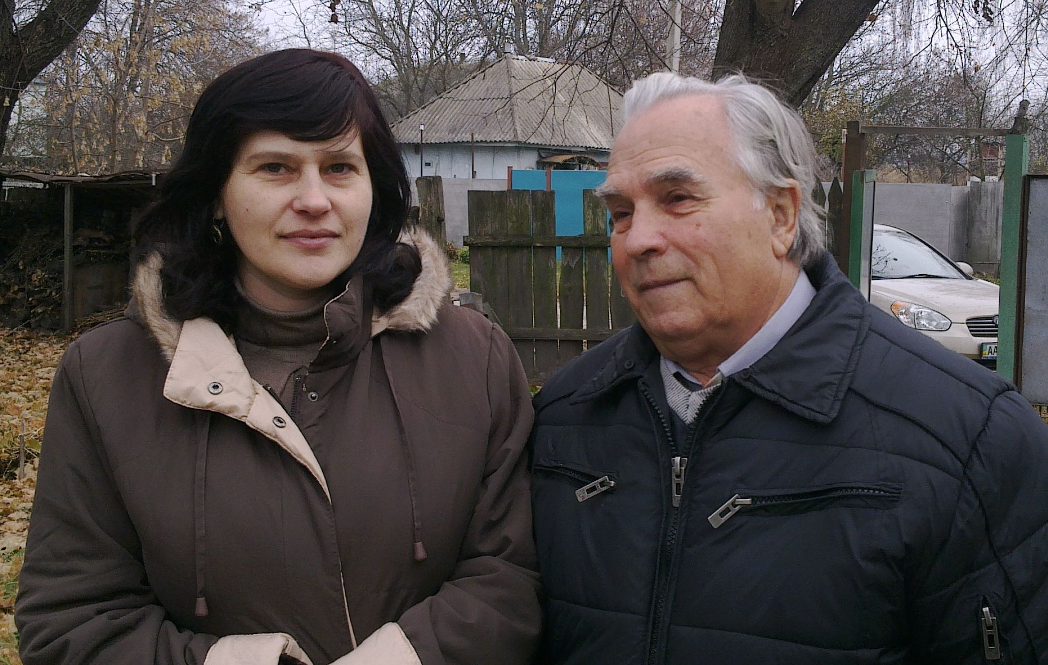 Українська поетеса і журналіст Тетяна Череп і письменник і краєзнавець Дмитро Андрієвич Головко. Село Мочалище